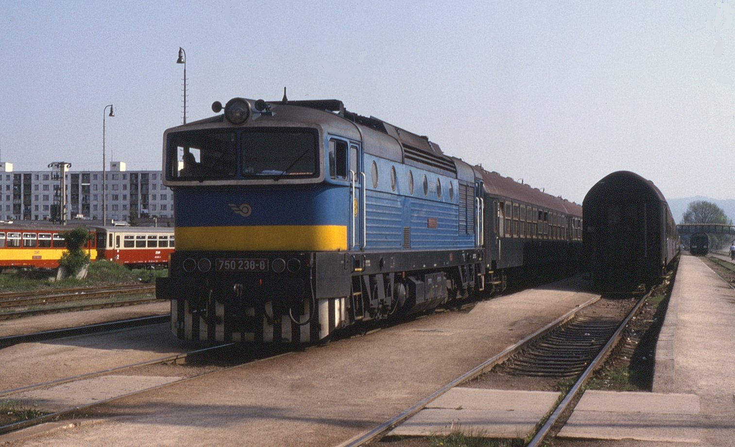 Vlak Železnic Slovenské republiky s motorovou lokomotivou 750.238, Prievidza